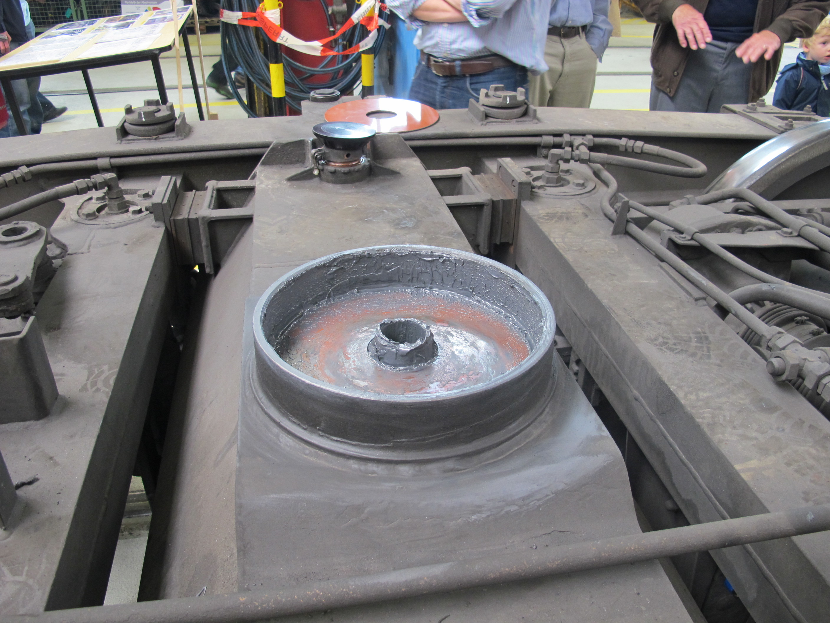 Drehgestellt mit unterer Drehpfanne